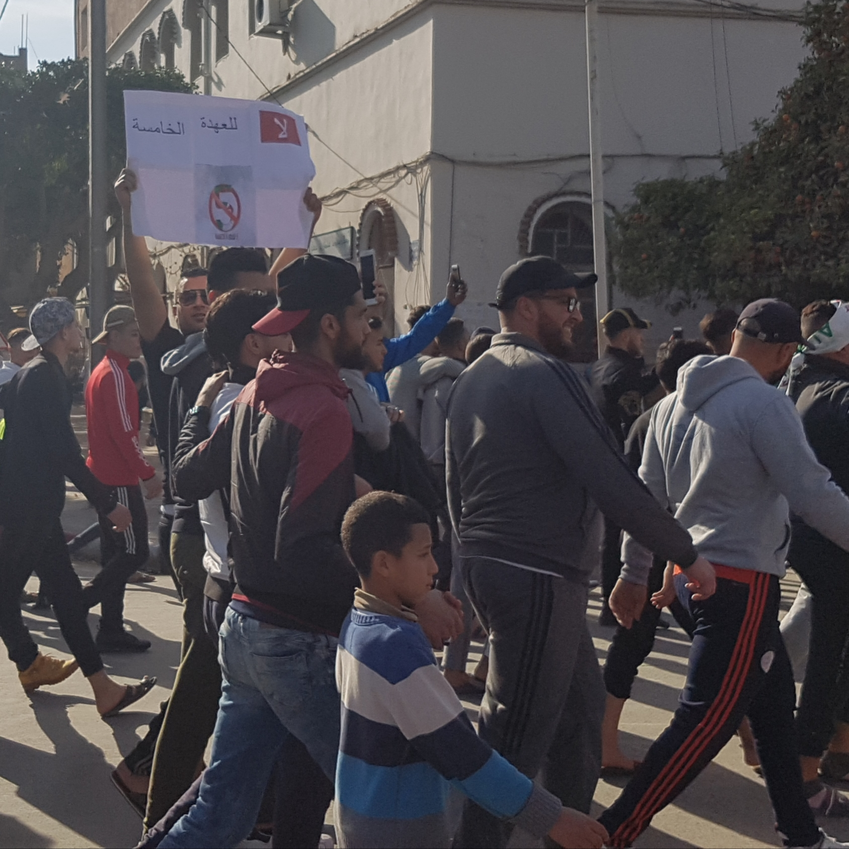 Algeria Protests 2019 2ndweek